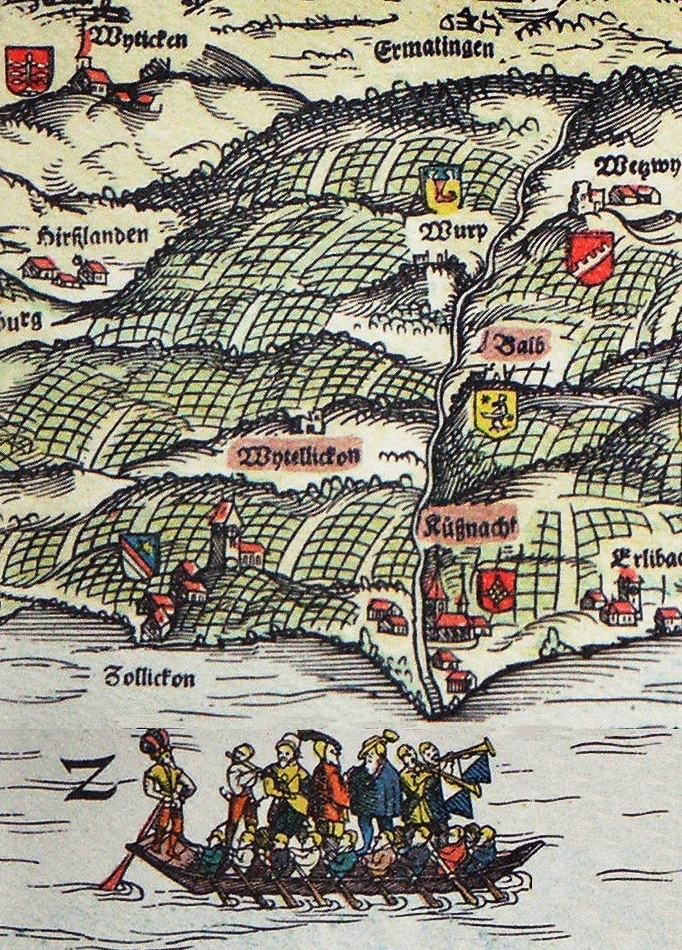 Karte der Kantonskarte von Jos Murer von 1566